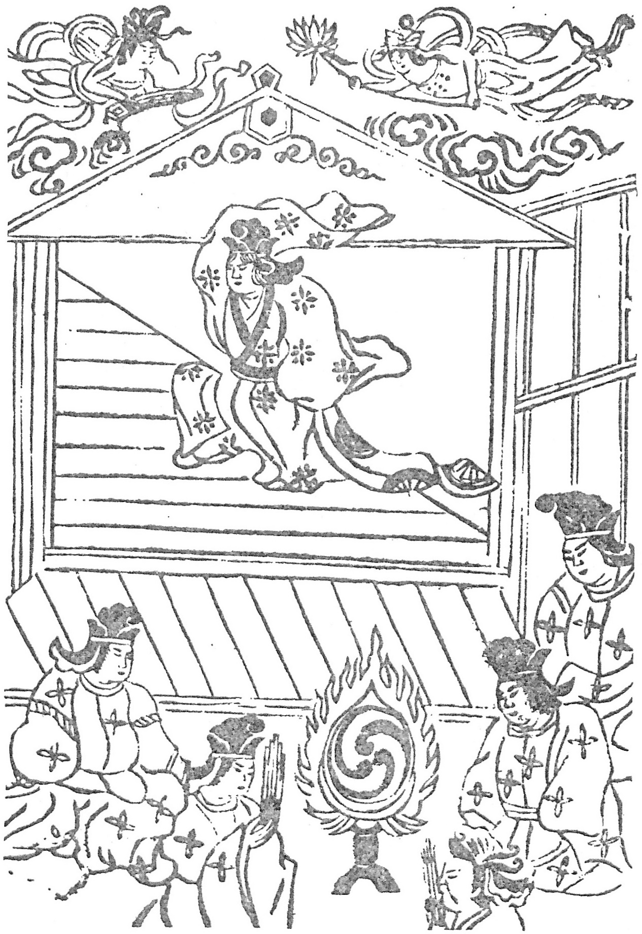 説経節『せつきやうしんとく丸』（1648年、京板）